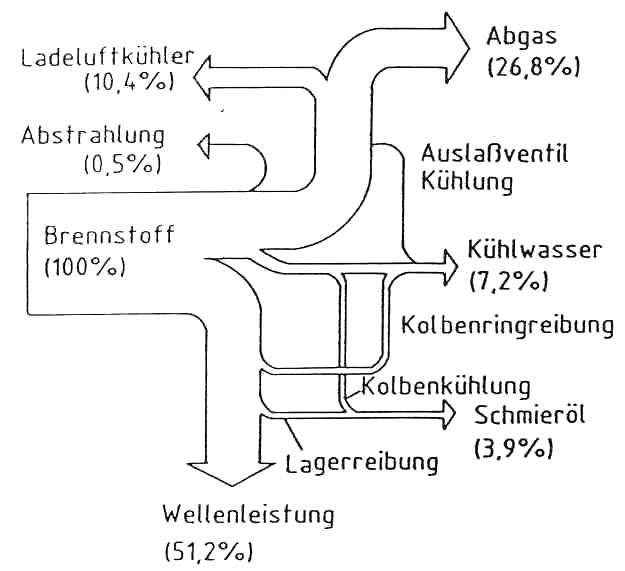 Sankeydiagramm für einen Schiffsdiesel